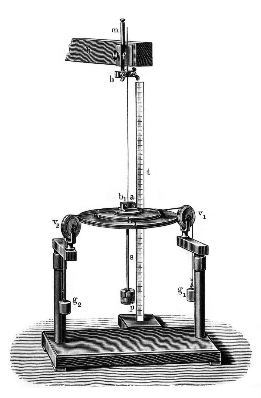 Apparat zur Bestimmung der Torsionsgesetzte (Holzstich)